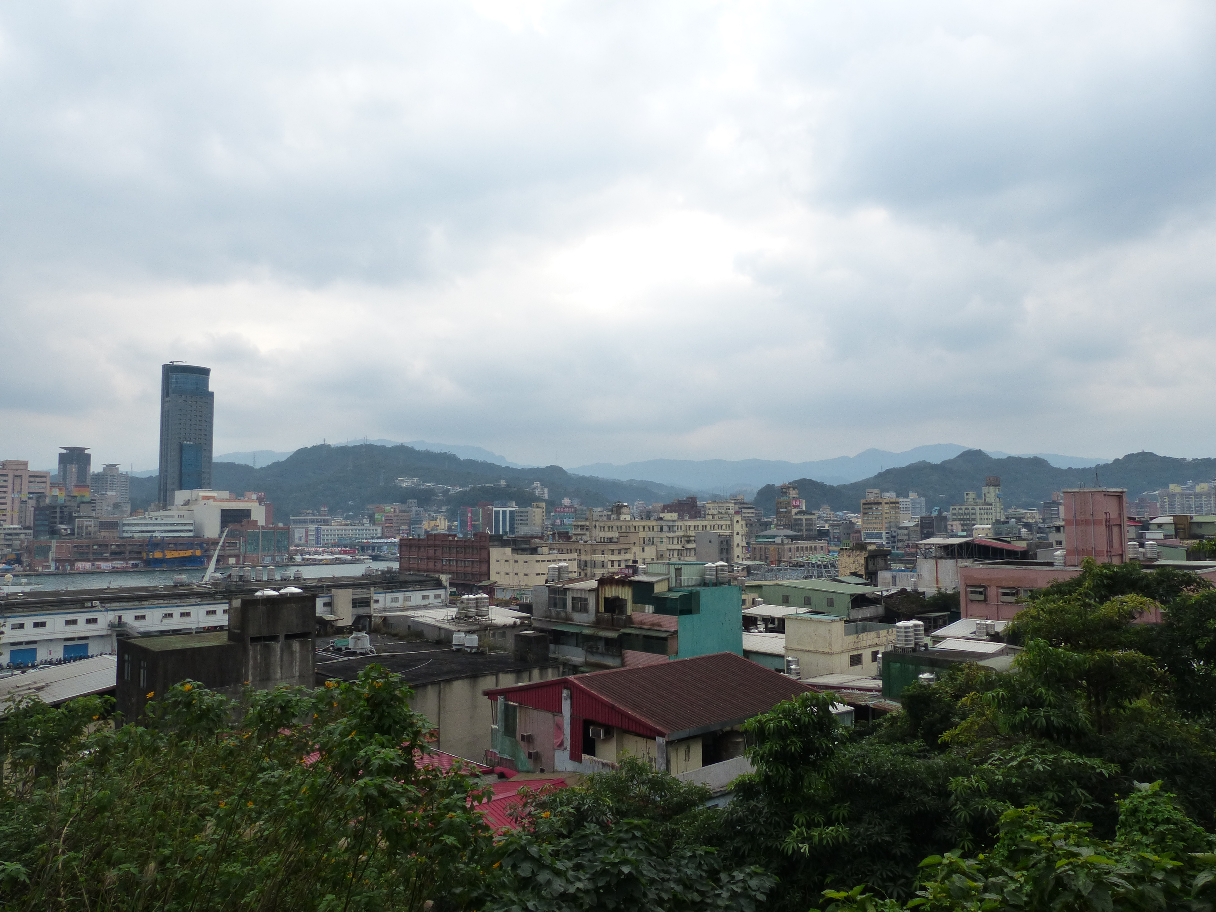 中文（台灣）: 從港西國小校舍前階梯東南俯瞰基隆市仁愛區與基隆港。